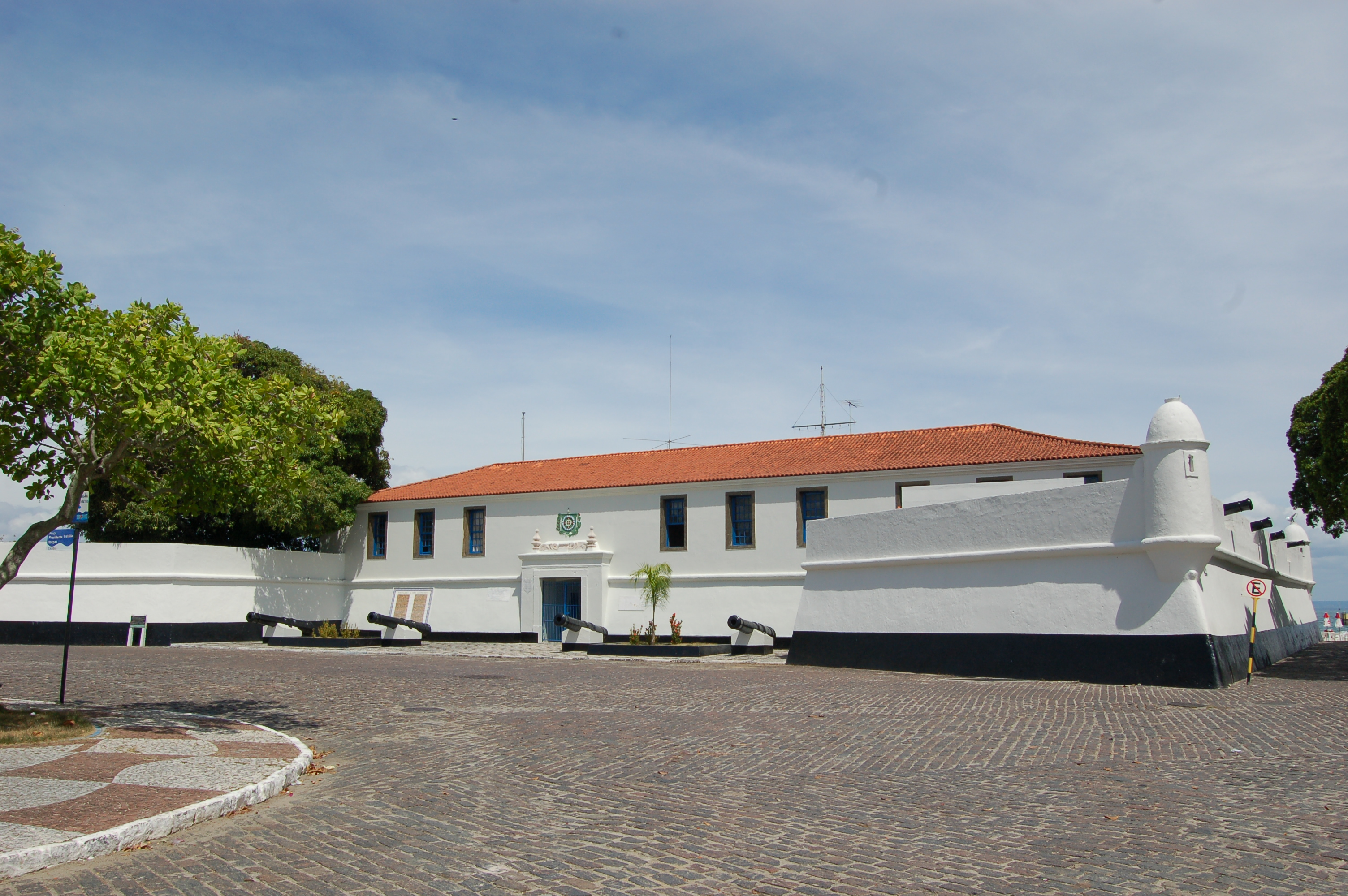 Itaparica - Forte São Lourenço. Foto: Rita Barreto - Setur